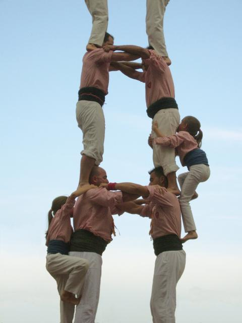 Castells la diada de Sant Joan 2006 a Tarragona. Aixecadora (dreta) i anxaneta (esquerra) pujant per una torre. Colla Xiquets de Tarragona, la vella.